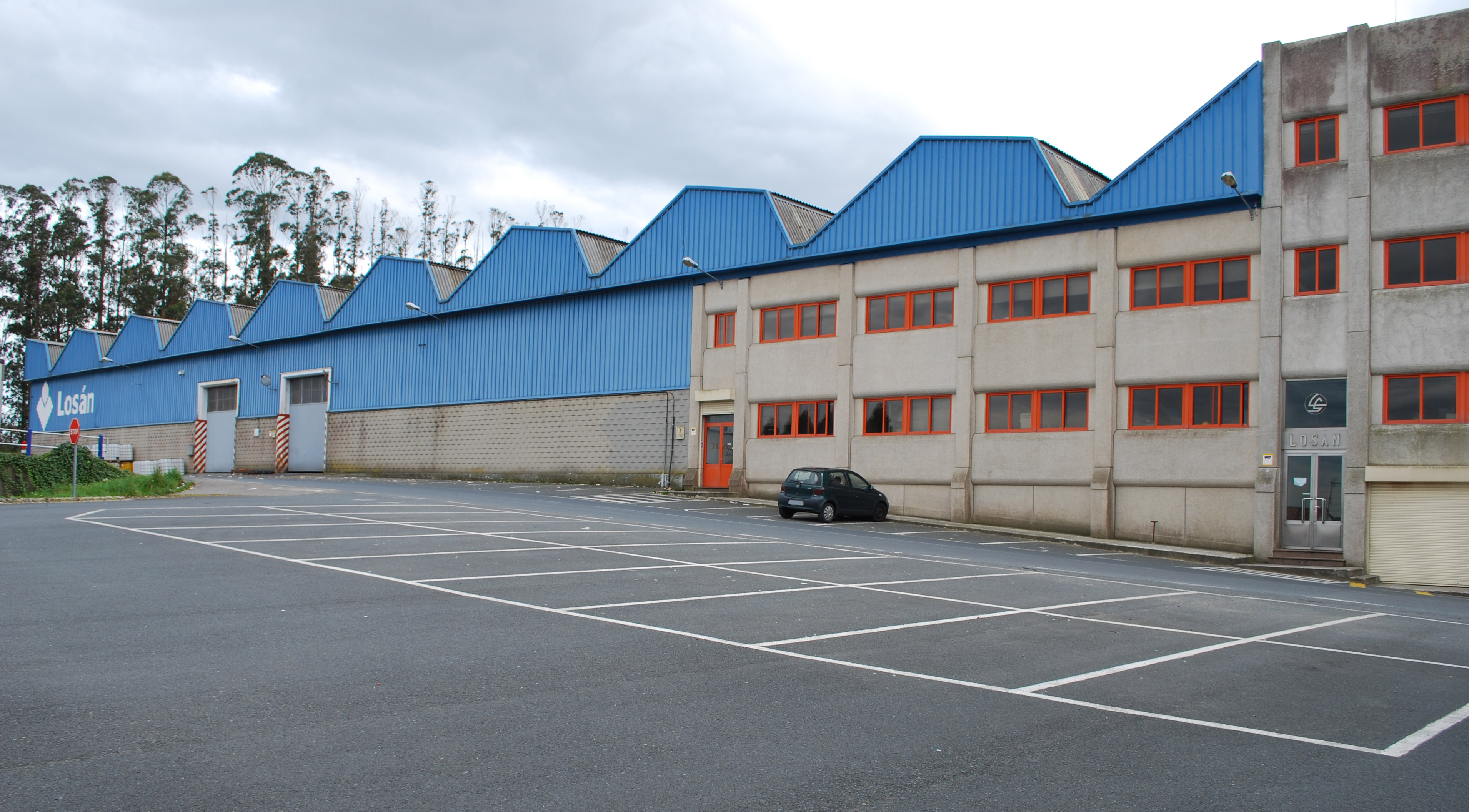 Fabrica de Losán en Curtis, A Coruña Galiza